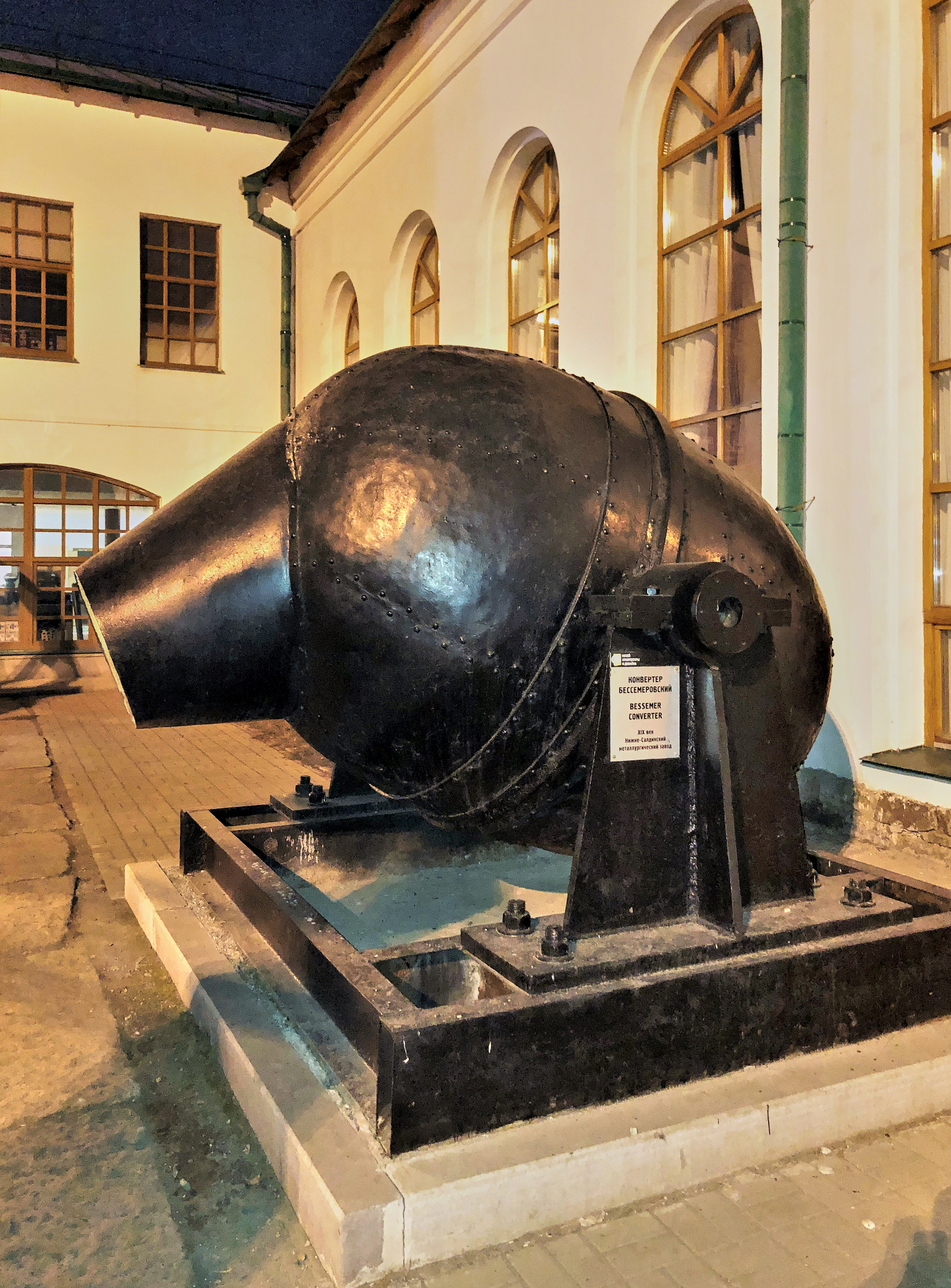 Модель бессемеровского конвертера Нижне-Салдинского завода (XIX в.) в экспозиции Музея архитектуры и дизайна УрГАХУ в Екатеринбурге